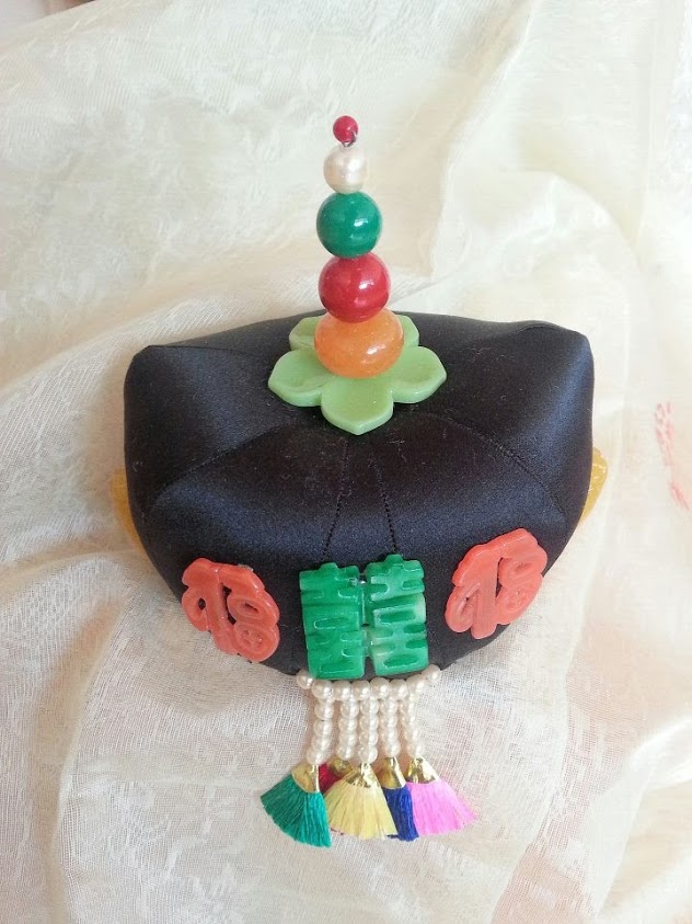 원삼에 주로 하던 족두리